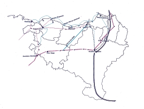 Erromatarren galtzadak Euskal Herrian